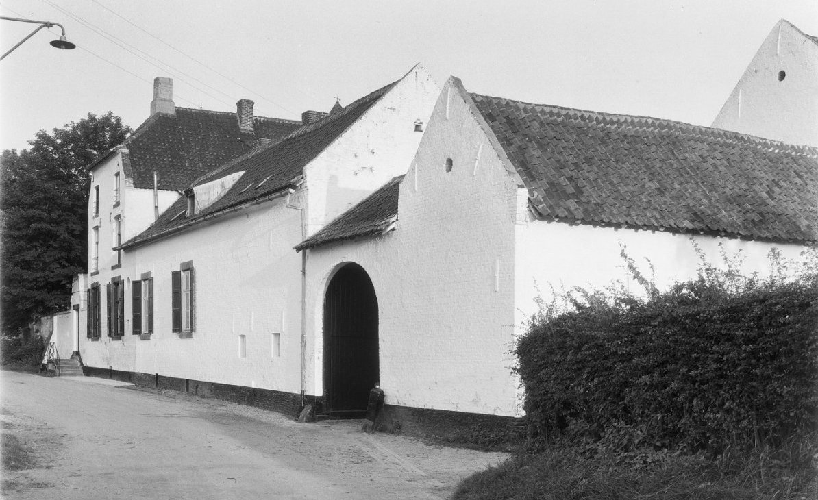 Tiendschuur of Hagenhof: Overzicht gesloten hoeve met witgeschilderde gevel